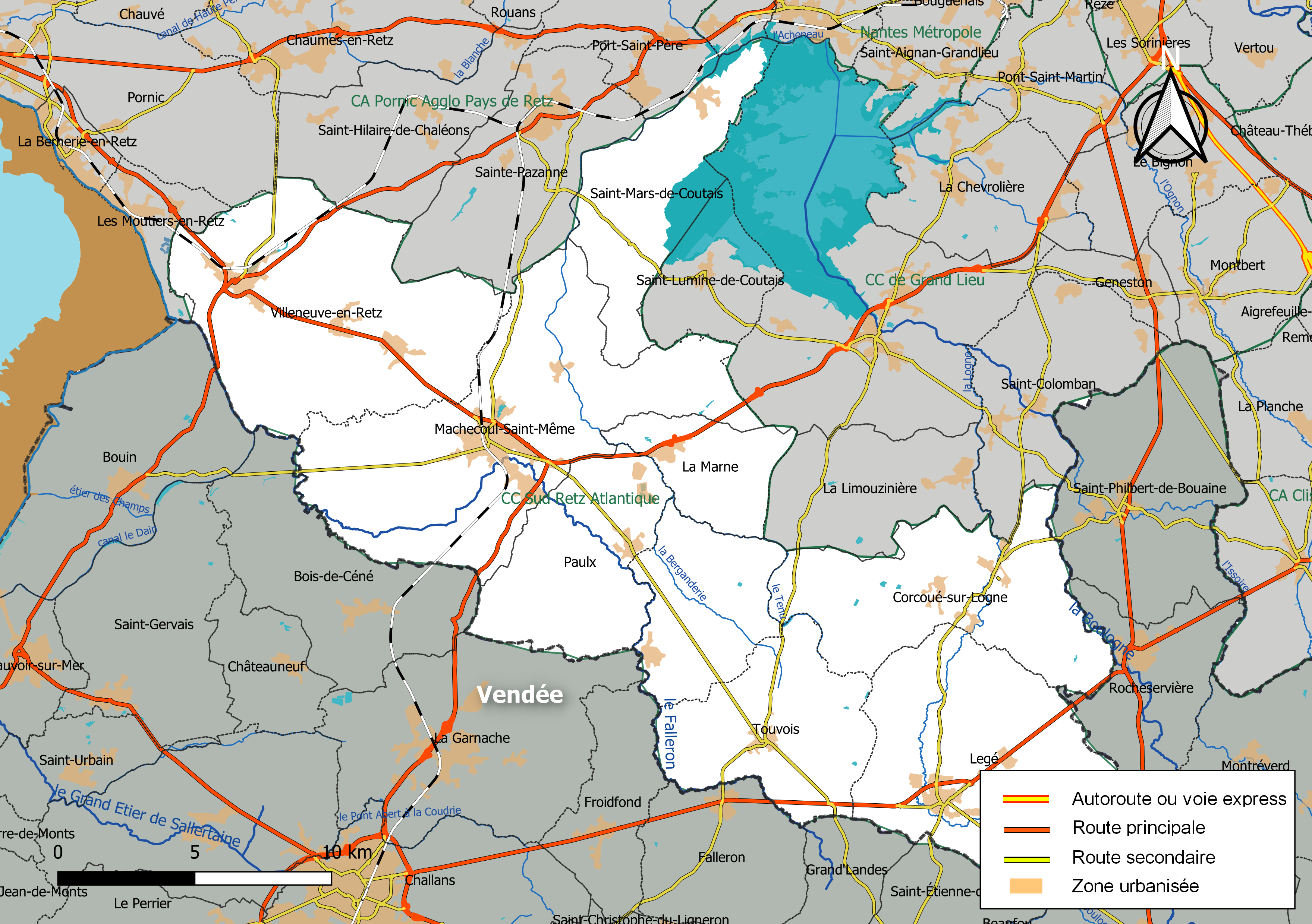 Carte géographique de la Communauté de communes Sud Retz Atlantique, département de la Loire-Atlantique, France. Composition au 1er janvier 2019.